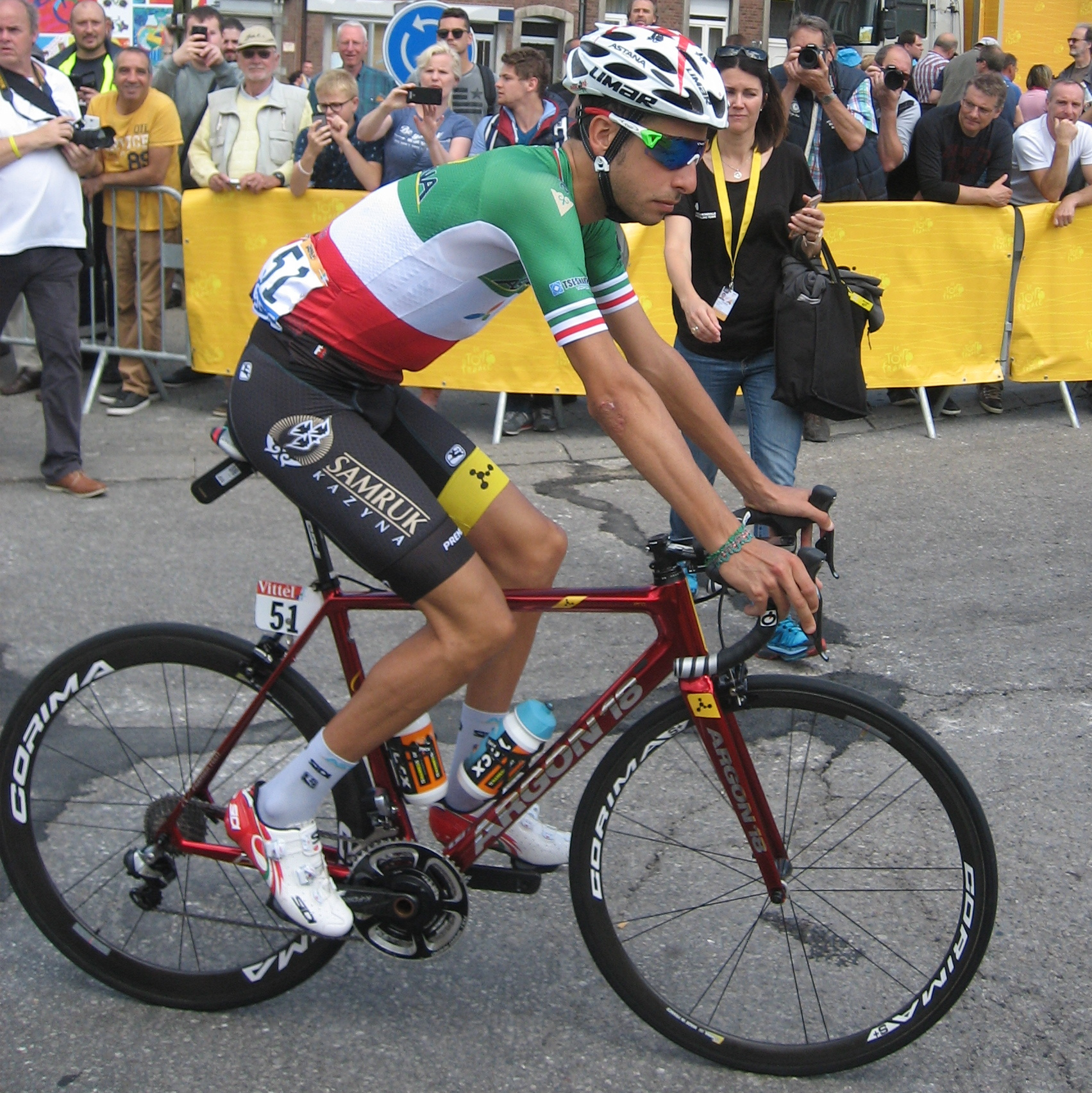 Start in Verviers (België) van de 3e etappe van Le Tour de France 2017.